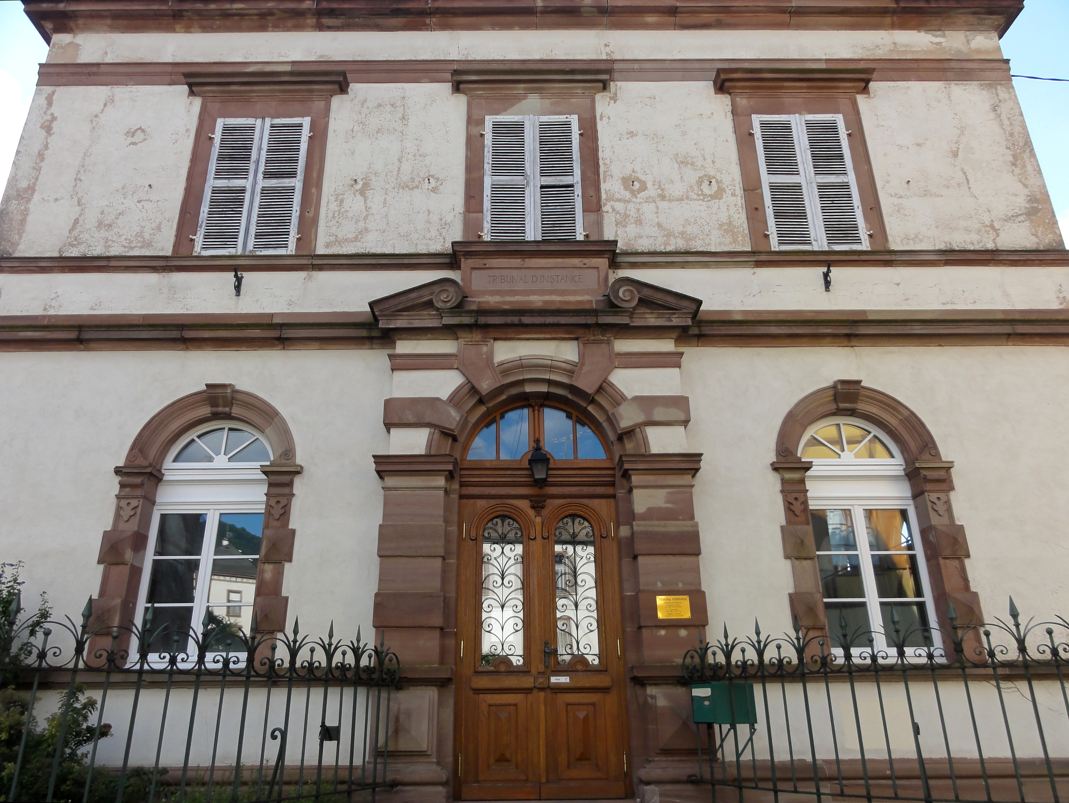 Alsace, Haut-Rhin, Ribeauvillé, Tribunal d'instance (XIXe), 6 rue Klee. .